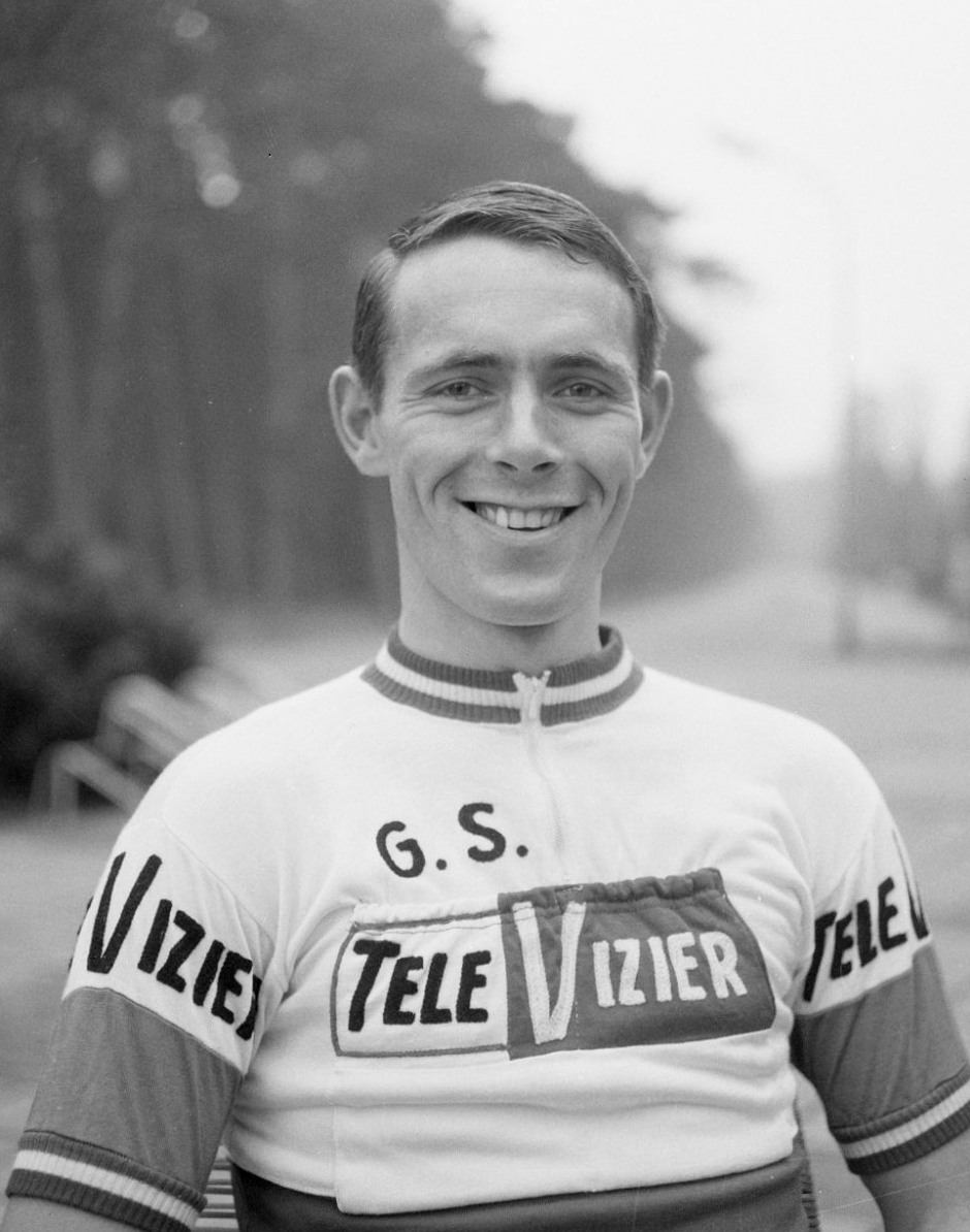 Nederlandse wielerploeg aan Tour de France 1964 gepresenteerd, Jan Hugens